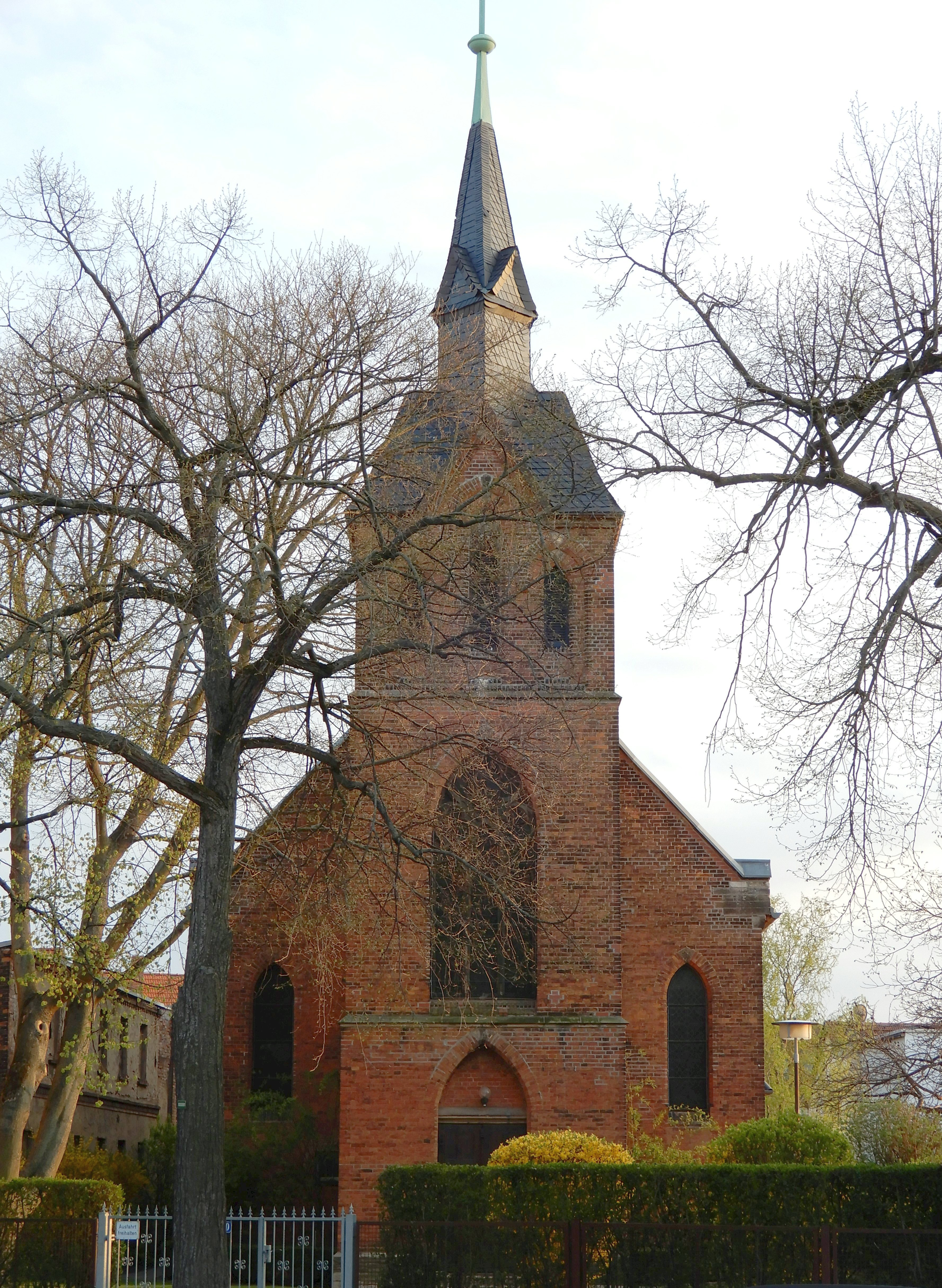 Ehemalige kath. Kirche St. Michael (1893-1979) in der Magdeburger Straße 10 in Aschersleben, seit 1979 Michaelshaus